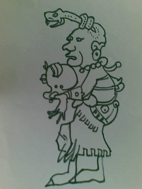 Reprezentare aproximativă modernă a lui Ixchel din Codexul Dresden. Cu alte cuvinte l-am desenat în propria concepţie cu markeru pe o coală de hârtie